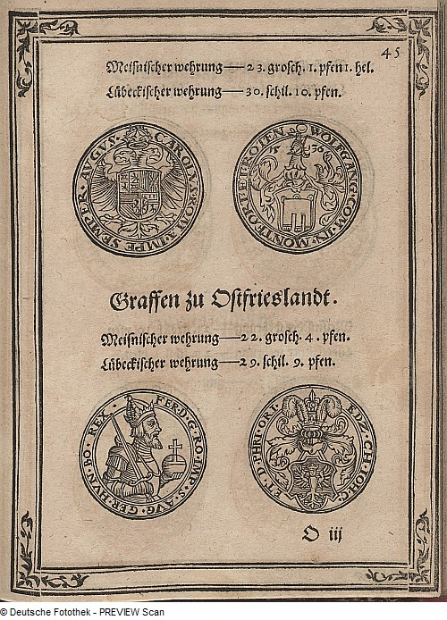 Original image description from the Deutsche Fotothek Geldwesen & Münzwesen & Münze & Taler